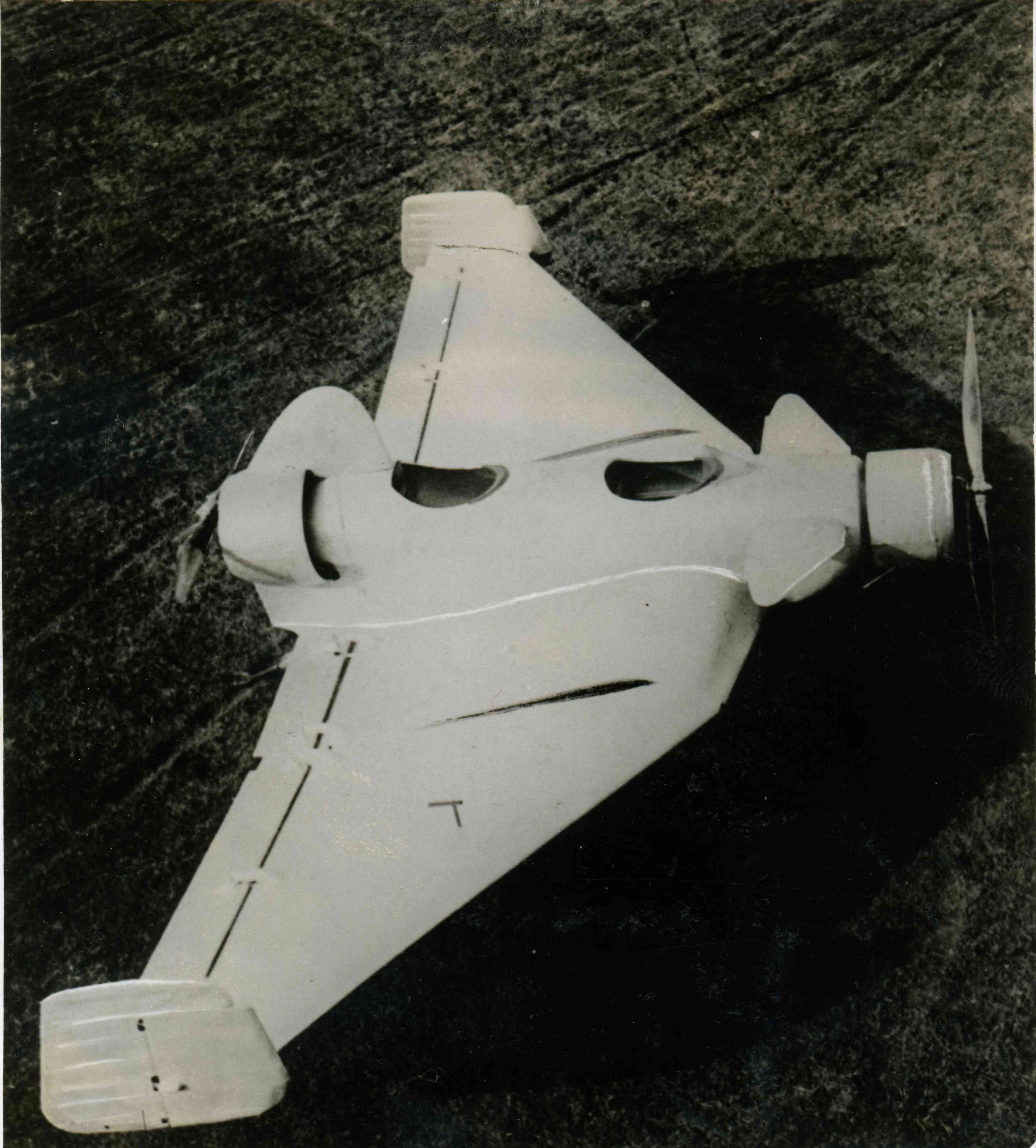 Foto der Fieseler F3 "Wespe", ein zweimotoriges, schwanzloses Sport- und Reiseflugzeug. Zwei Sitze hintereinander. Zwei 75 PS Pobjoy-Motore in Tandemform. Fügel hochklappbar. Gebaut bei dem Fieseler Flugzeugbau Kassel.